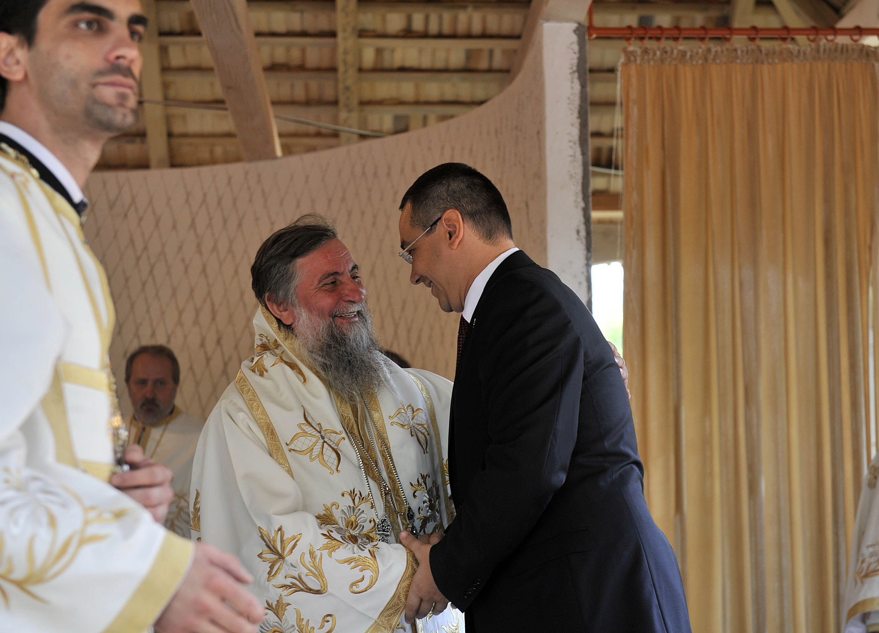 Victor Ponta la sarbatoarea hramului Manastarii Maglavit - 08.09 (8)